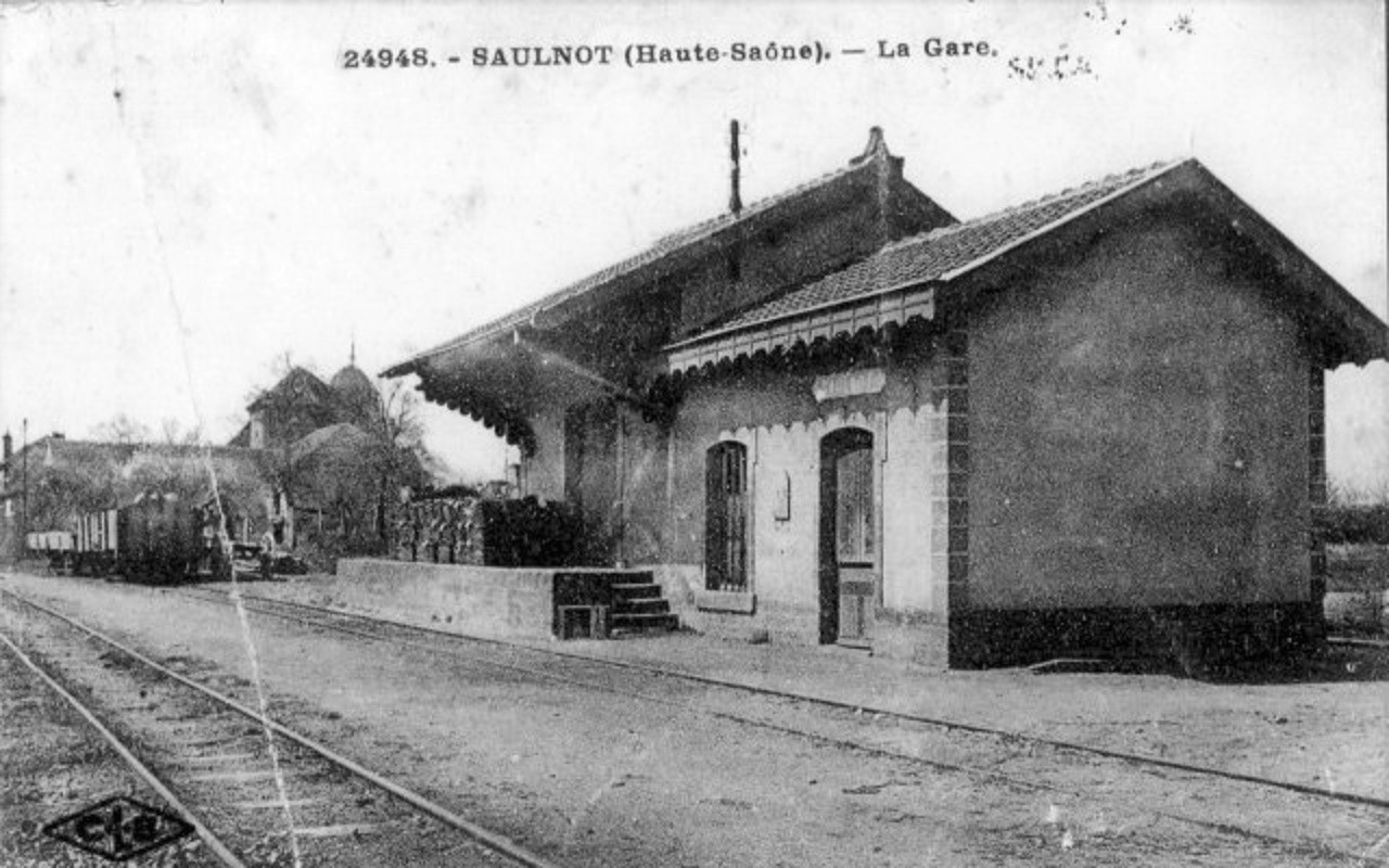 La gare du Tacot (Chemins de fer vicinaux de Haute-Saône) de Saulnot en activité.